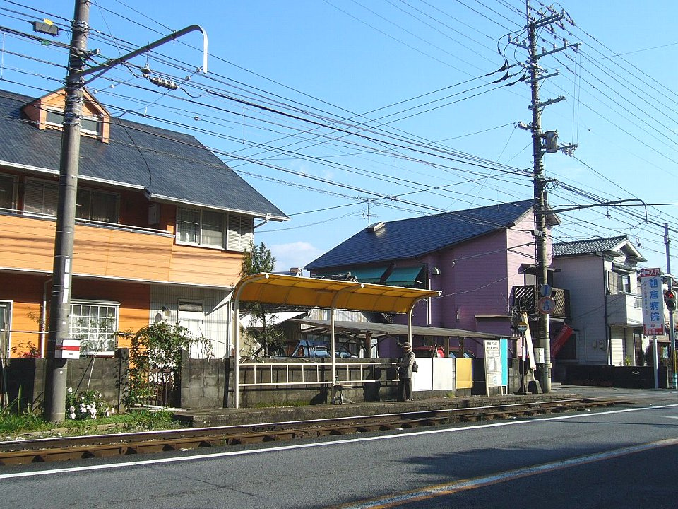 朝倉神社前停留場 北東望 ピンクの建物は宮の奥簡易郵便局